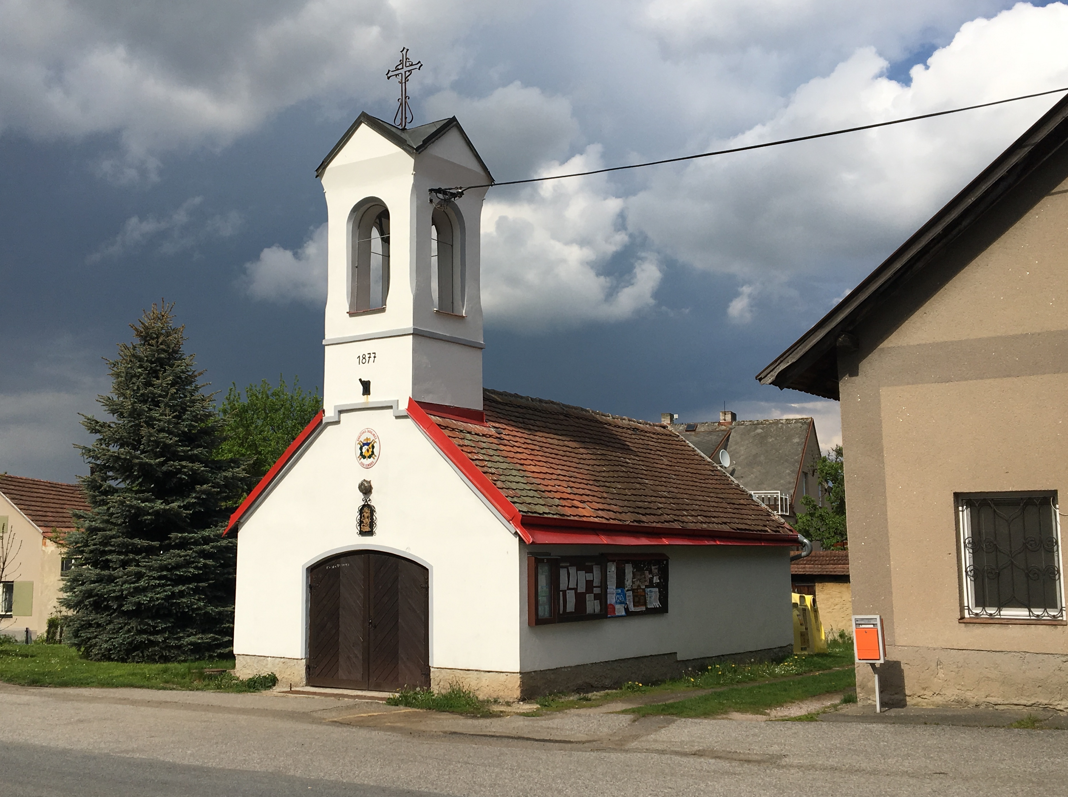 Vinary (u Vysokého Mýta) - hasičská zbrojnice